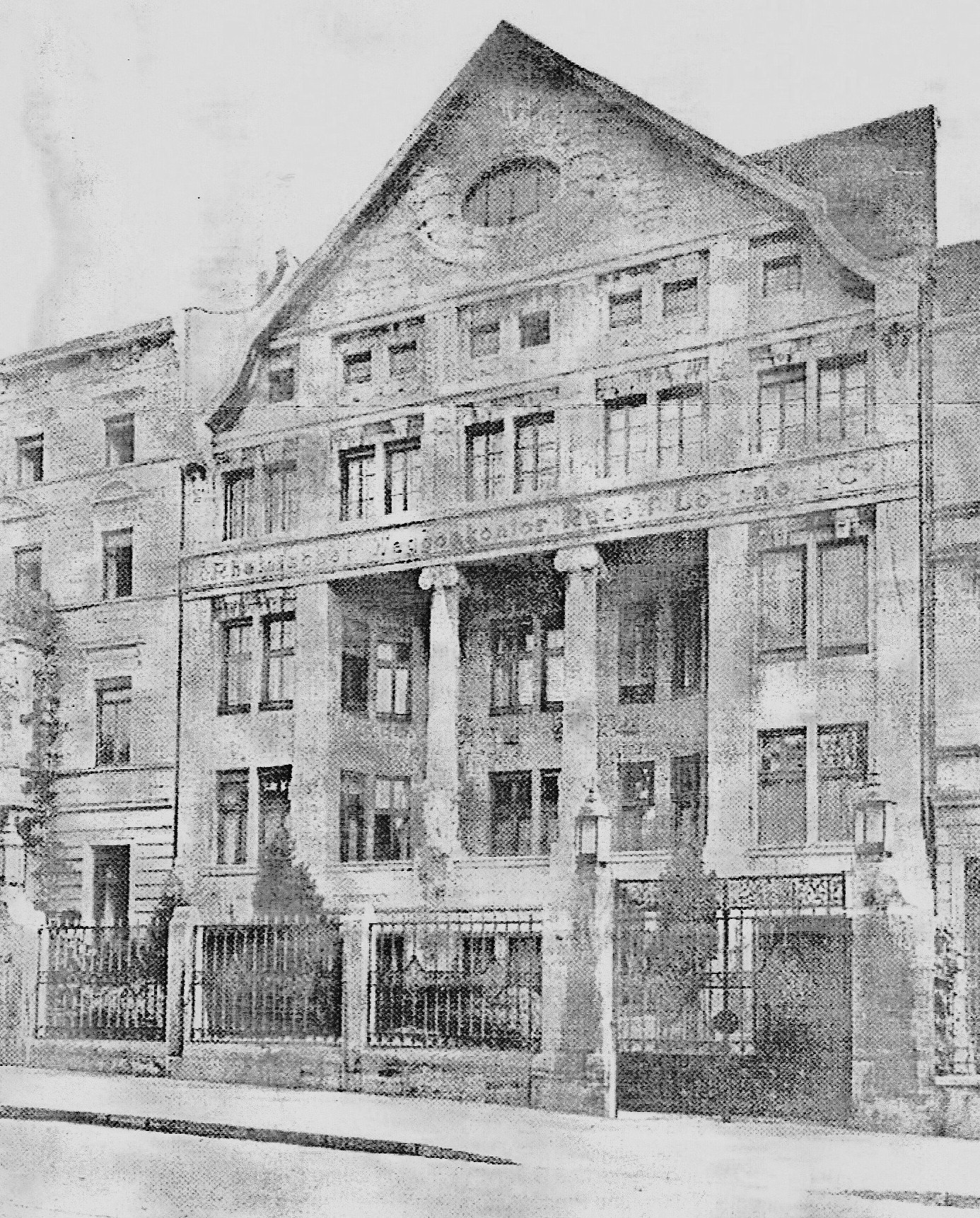 Scan eines alten Fotos der Honigmann-Villa, 1909/10 umgebaut von Arnold Königs, später Waggonkontor Fa. Lochner